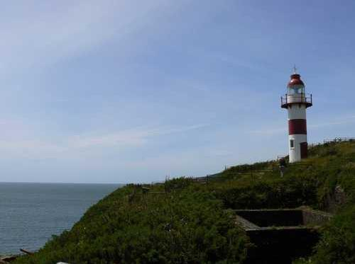 Faro Morro Niebla